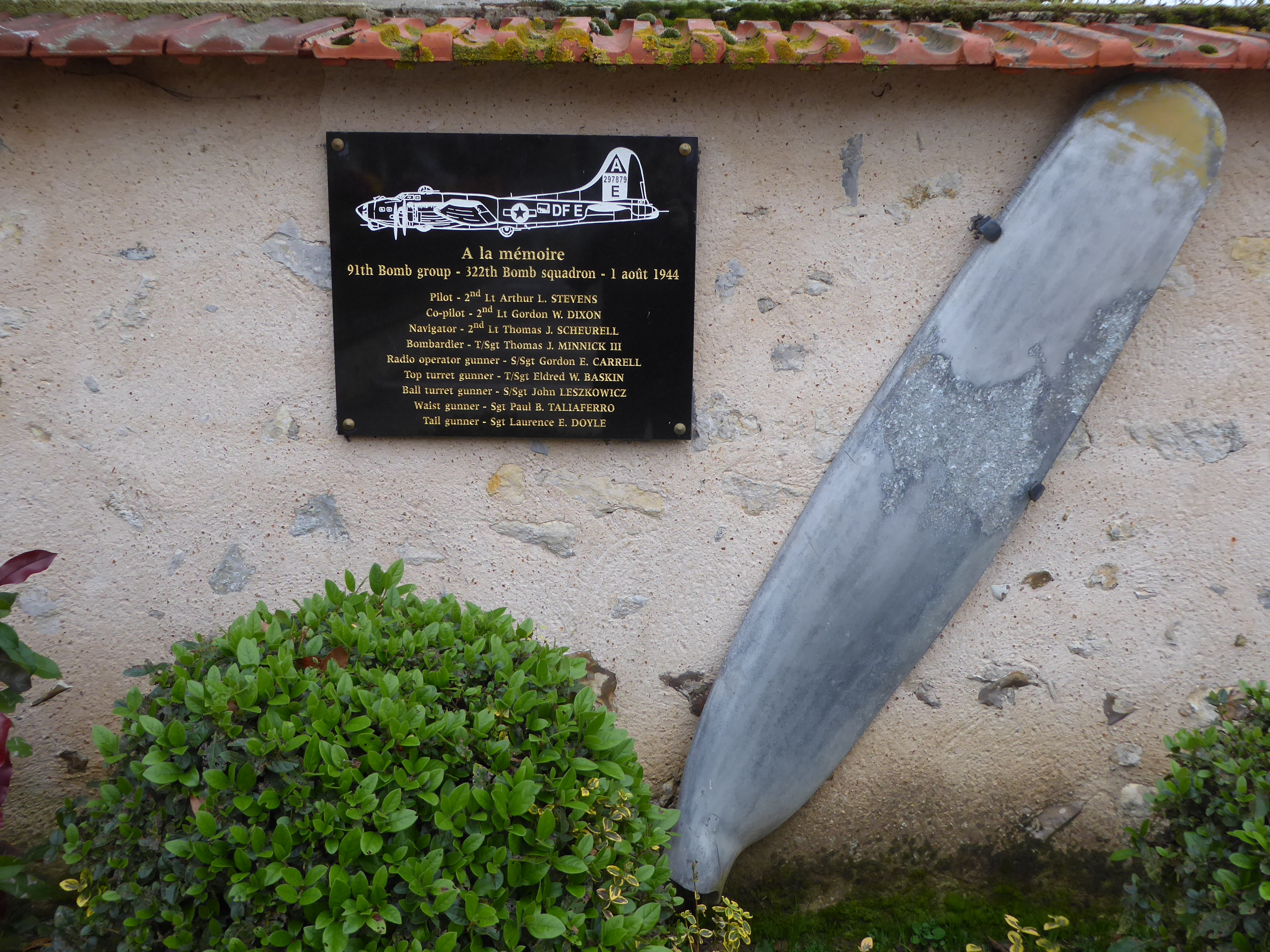 Monument aux morts des aviateurs américains lors du bombardement du 1er août 1944, Amilly, Eure-et-Loir (France).